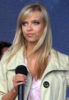 The Jet Set na dniu Otwartym TVP (9 września 2007)